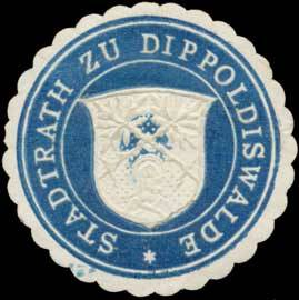 Siegelmarke Stadtrath zu Dippoldswalde